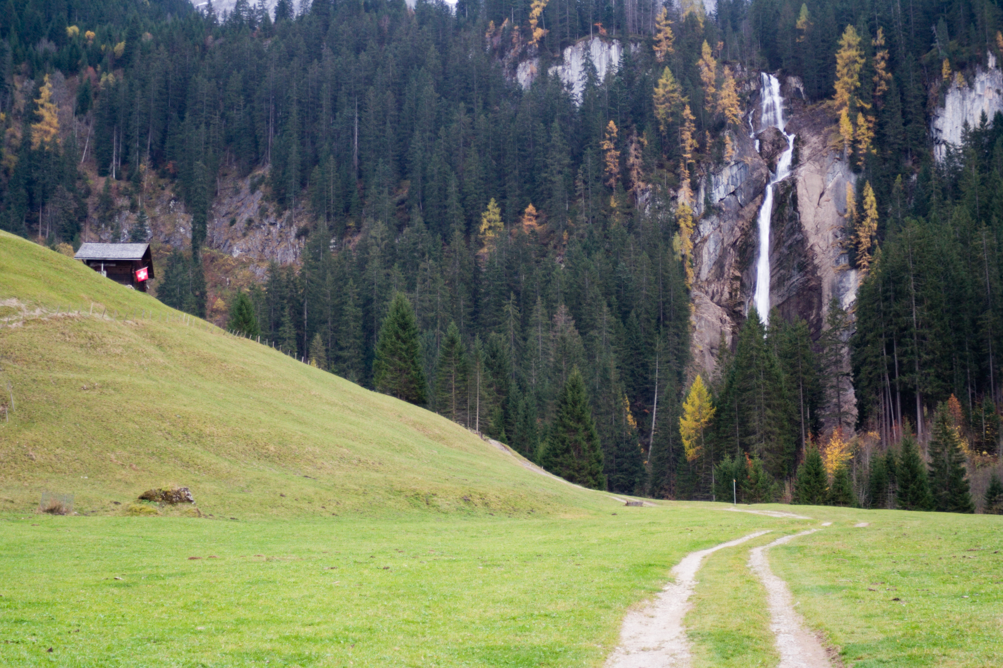 Iffigfall in Lenk, Schweiz